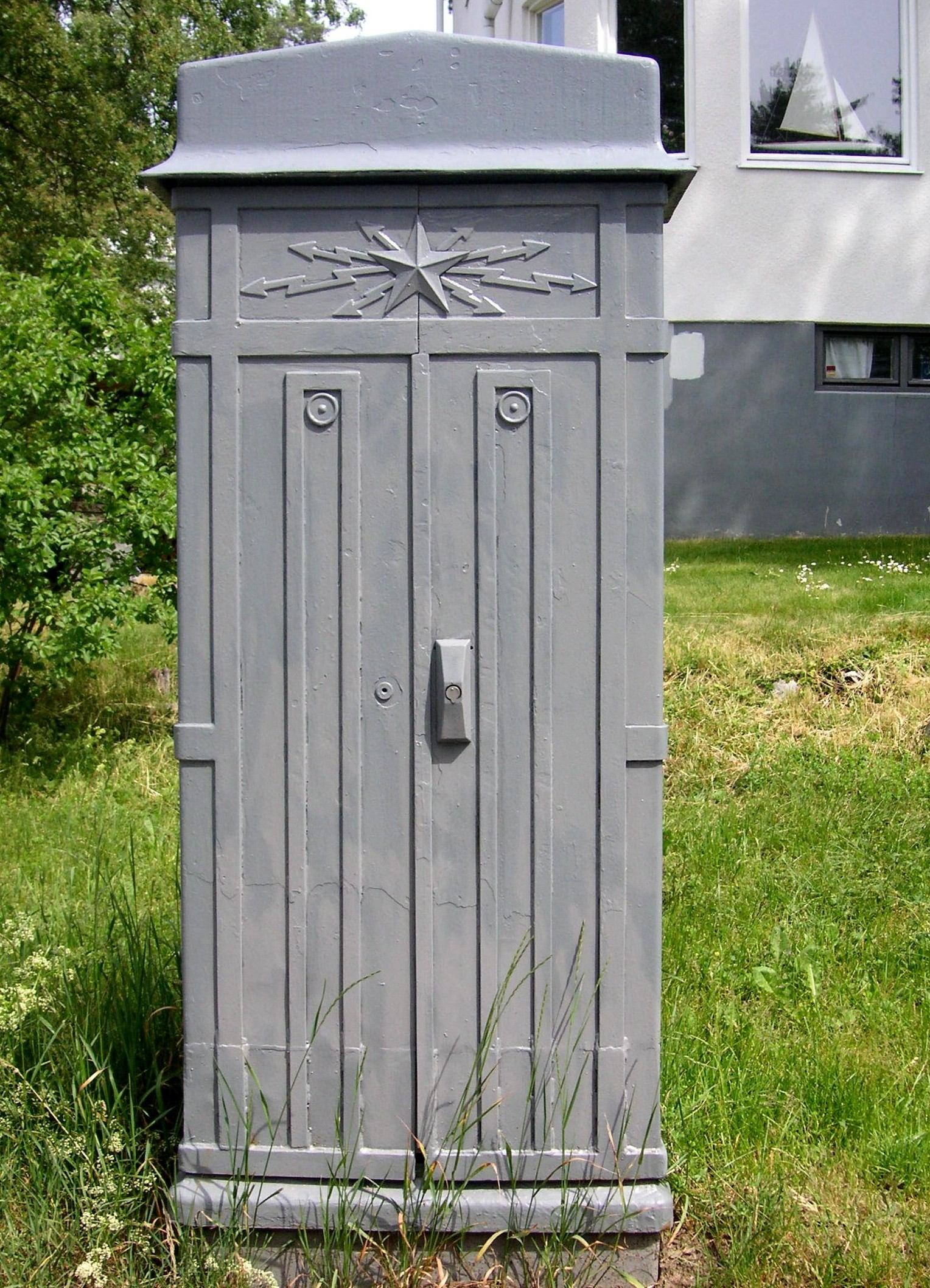 Södra Ängby, Bromma, Stockholm. Telverkets kopplingsskåp